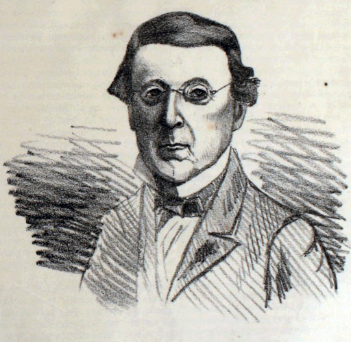 Melchor de Santiago-Concha y Cerda (Santiago de Chile, 17 de marzo de 1799 - † 26 de mayo de 1883). Fue un jurisconsulto y político chileno.